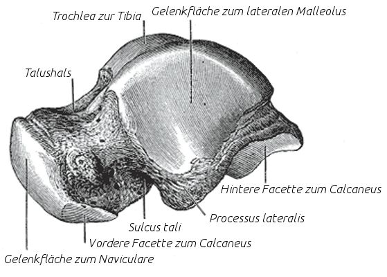 From Gray's Anatomy. Abgewandelt mit deutscher Beschriftung. Abgebildet ist das Sprungbein / der Talus in der Ansicht von aussen (lateral).